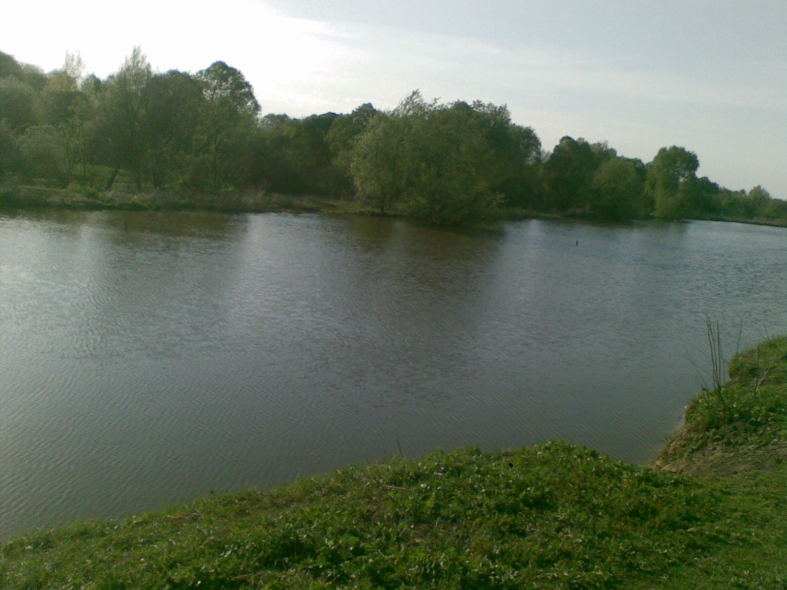 Кукілка_(річка).jpg: річка Кукілка біля села Шаповалівки (Сумська обл.)